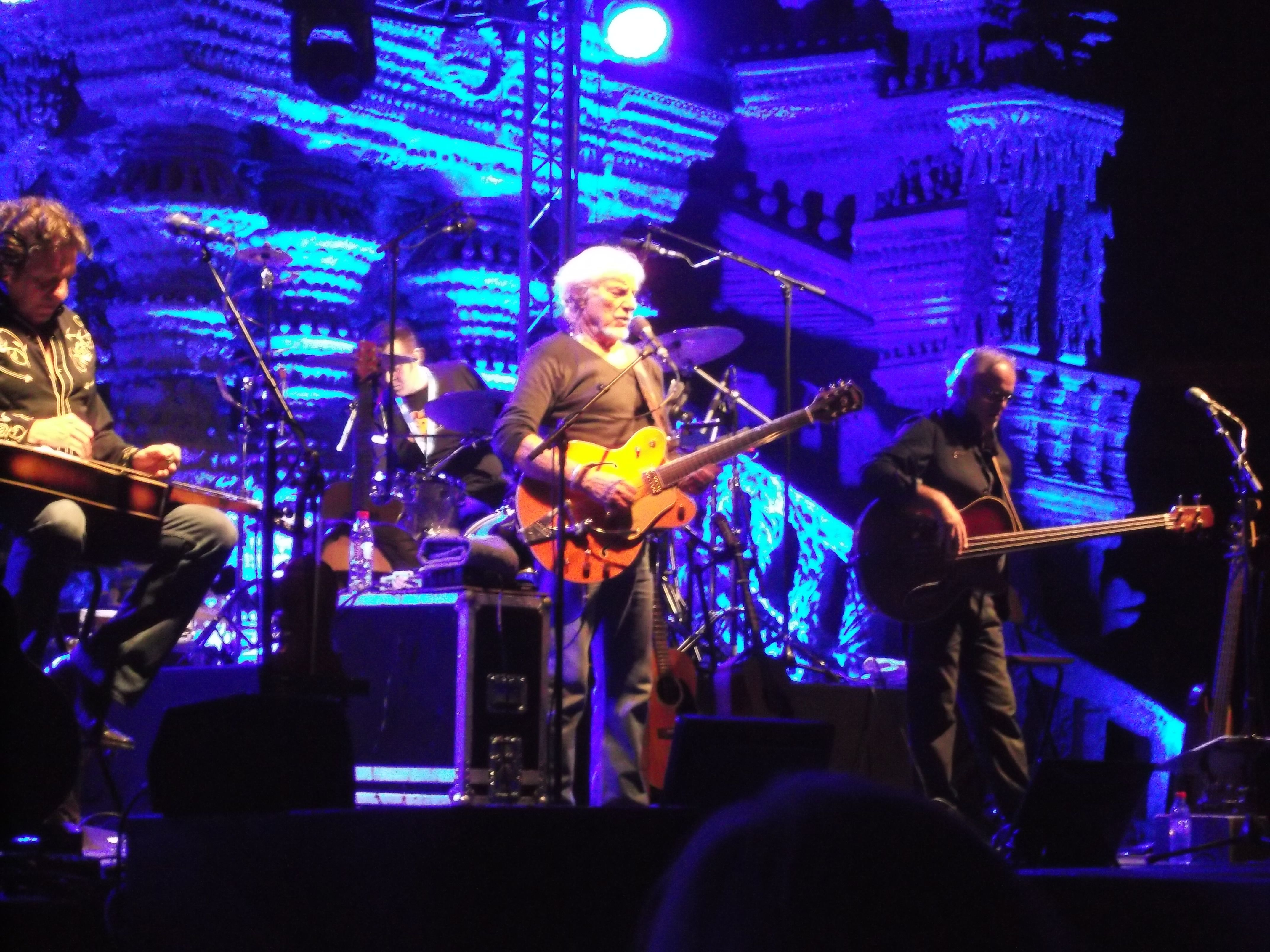 Hugues Aufray en récital au Palais Idéal du facteur Ferdinand Cheval